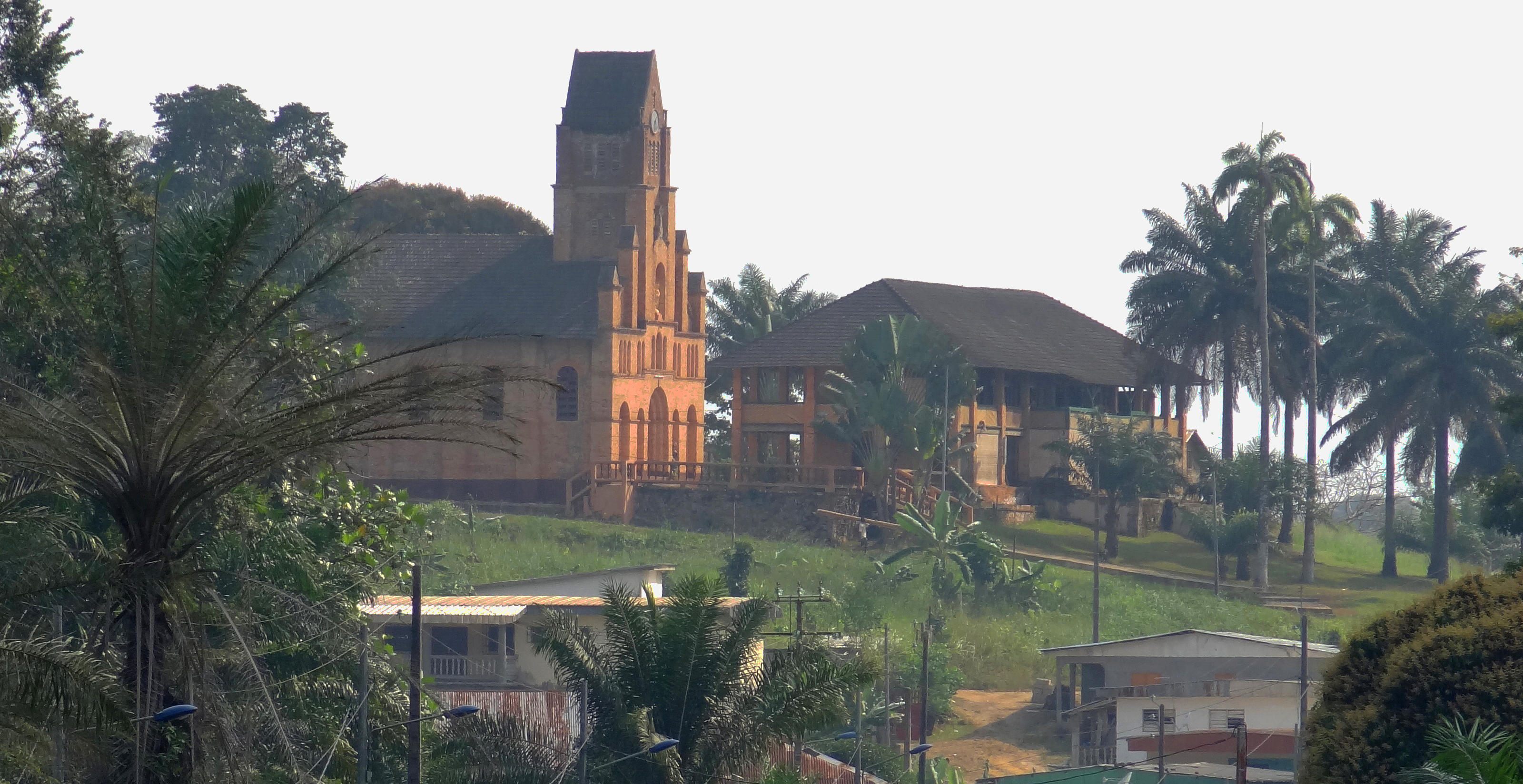 Mission spiritaine St François Xavier, construite et toujours animée par la congrégation à Lambaréné (Gabon)